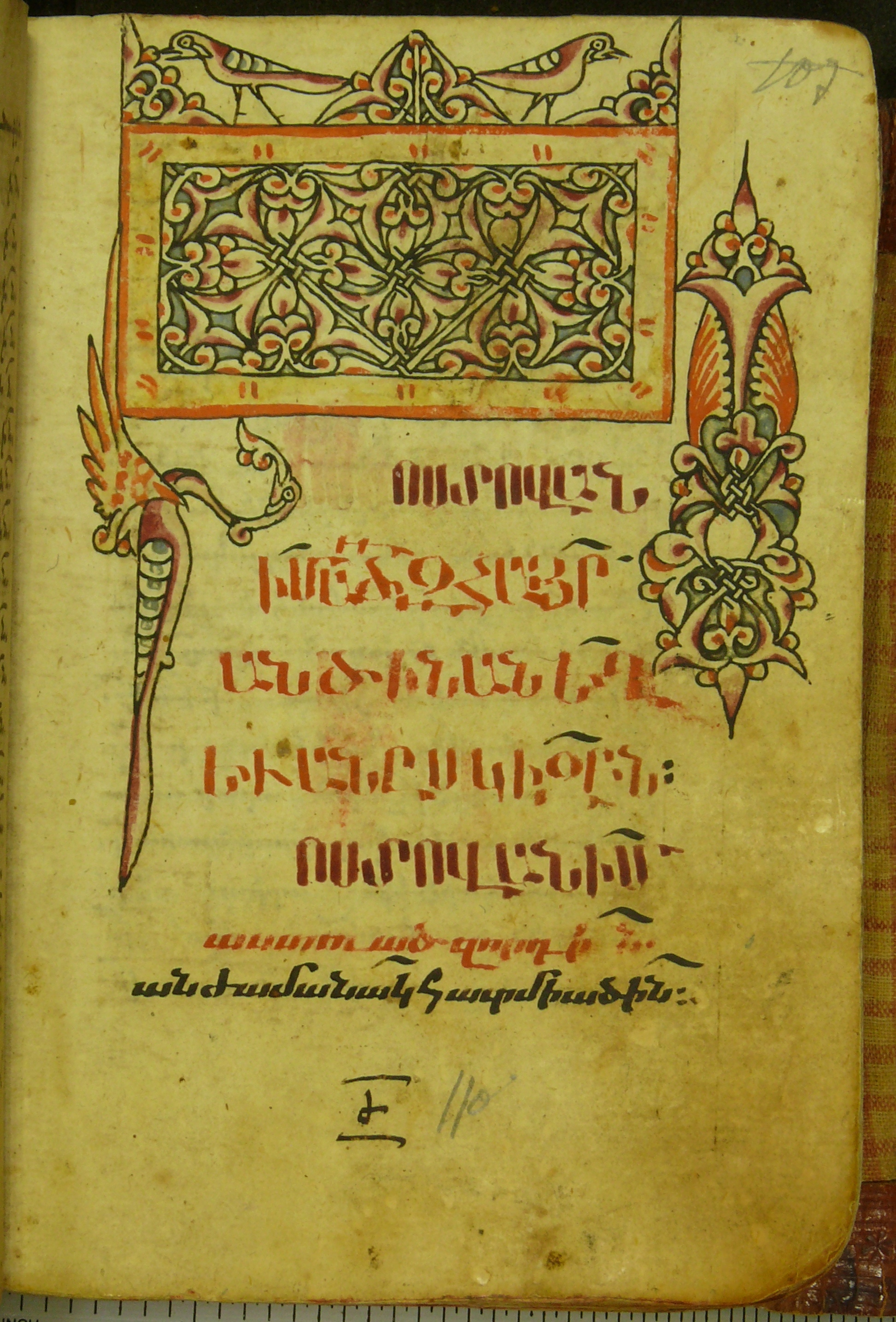 Ճակատազարդ, լուսանցազարդ, Երևան, 1625 թ. ՄՄ-1538-110ա